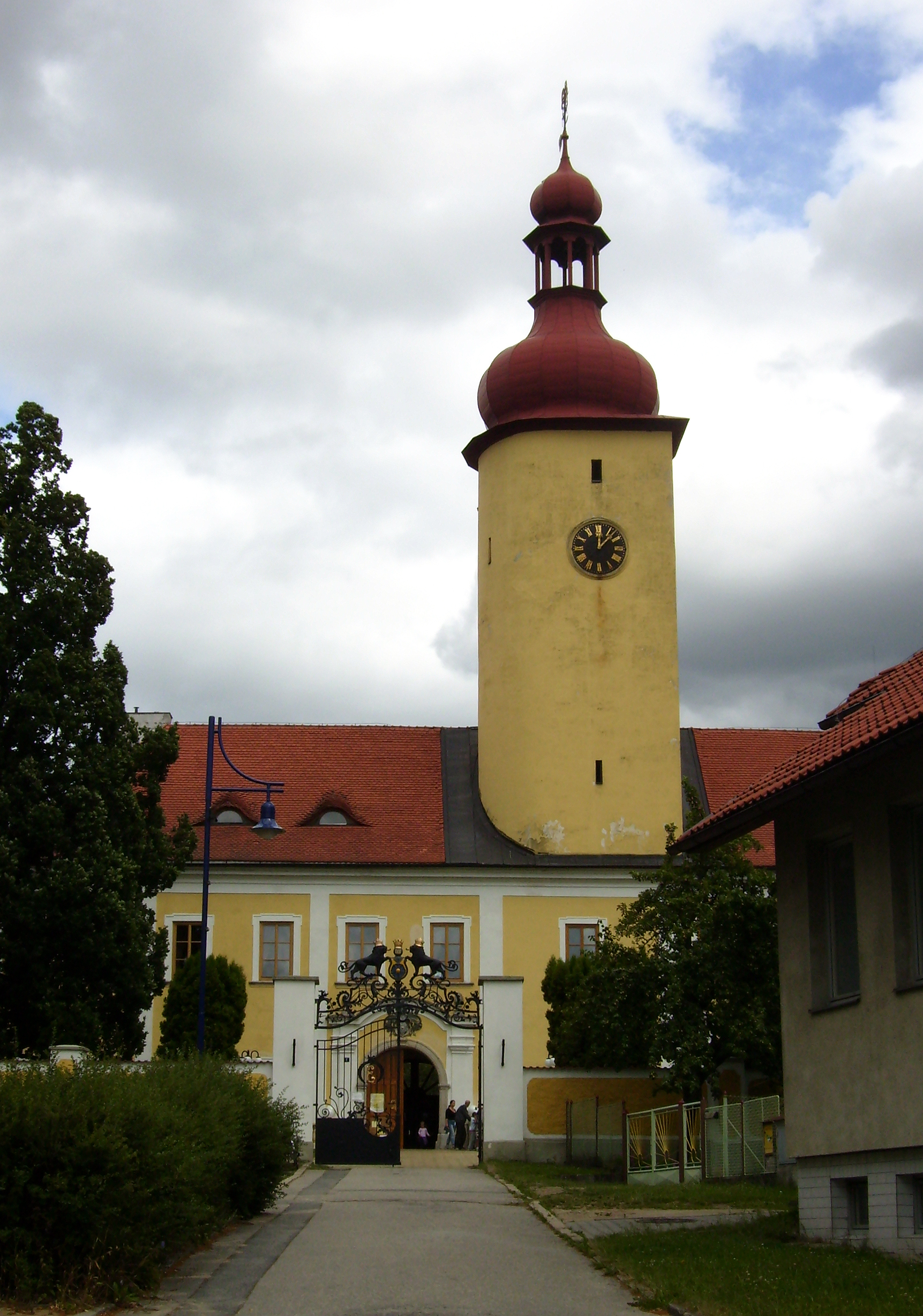 Česky: Zámek ve Stráži nad Nežárkou